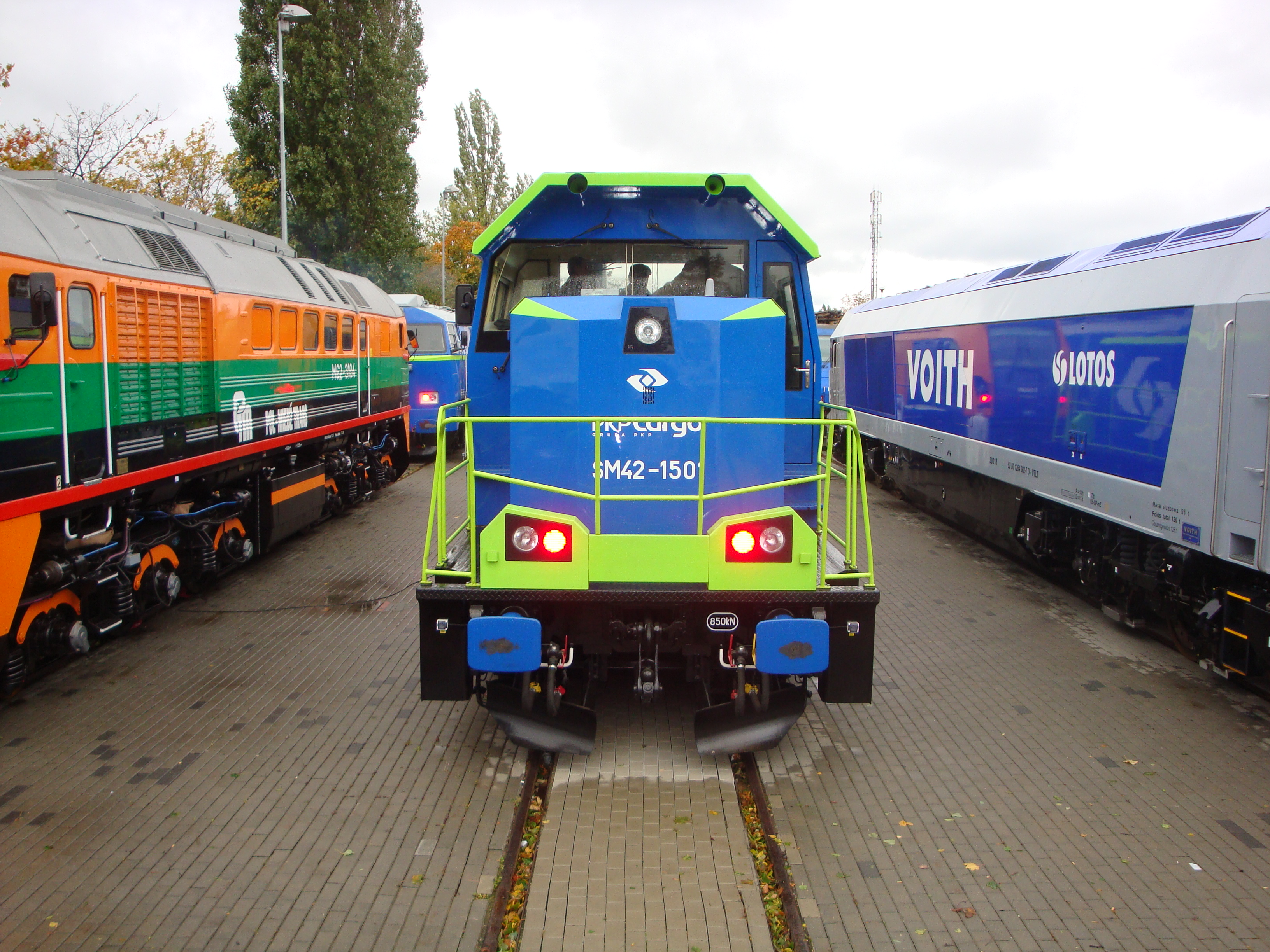 Zmodernizowana lokomotywa spalinowa SM42 należąca do PKP Cargo i prezentowana podczas targów kolejnictwa "Trako" w Gdańsku.